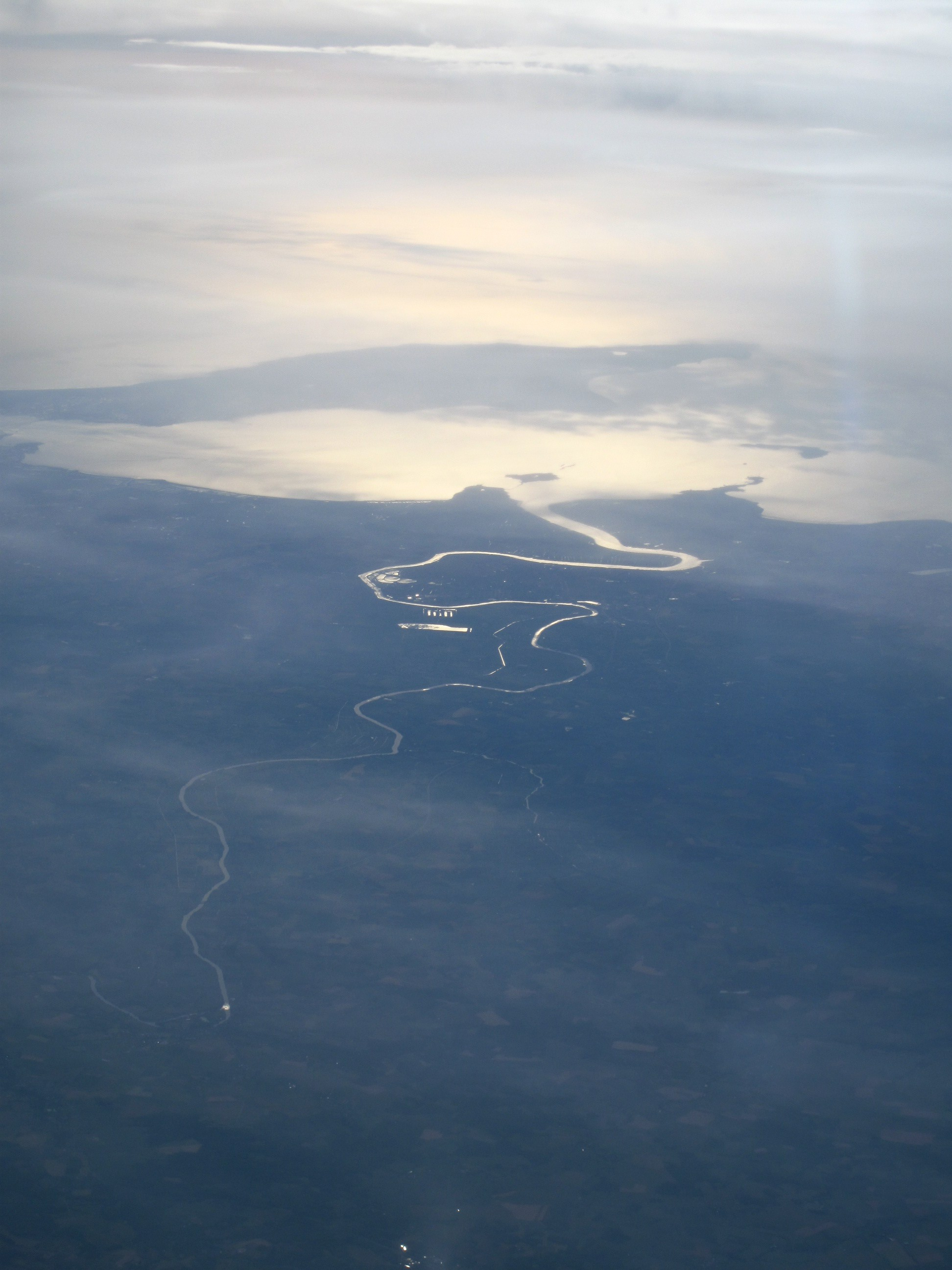 Le cours de la Charente, face à l'île d'Oléron et à l'île Madame (de Saint-Savinien à l'estuaire, Charente-Maritime, France)